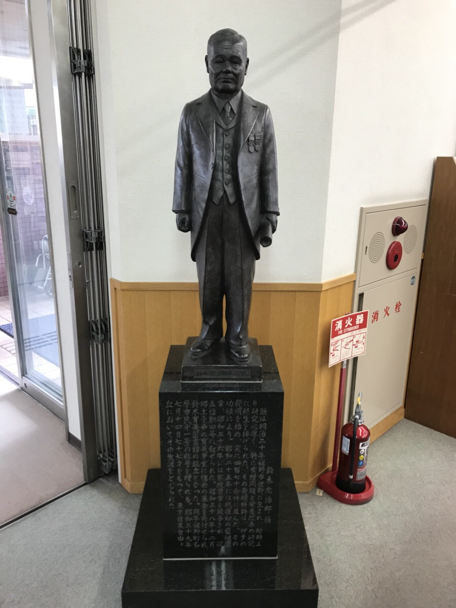 鈴木忠治郎の銅像（裾野市立鈴木図書館） 図書館より許可をいただき撮影（2018/5/6）